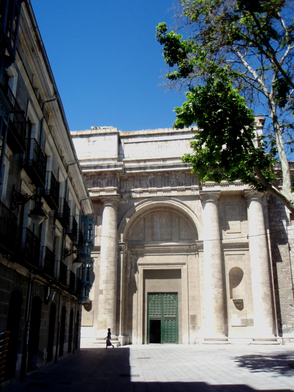 Cuerpo bajo de la fachada del crucero este, a la Plaza de la Universidad de la Catedral de Valladolid (España), construido por A. Arenillas siguiendo los planos de Juan de Herrera entre 1962 y 1964.